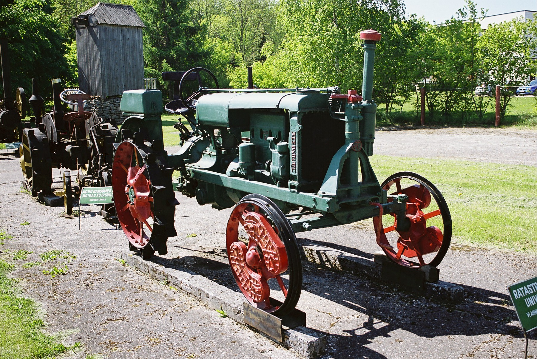 Ratastraktor Universal, Vladimiri traktoritehas